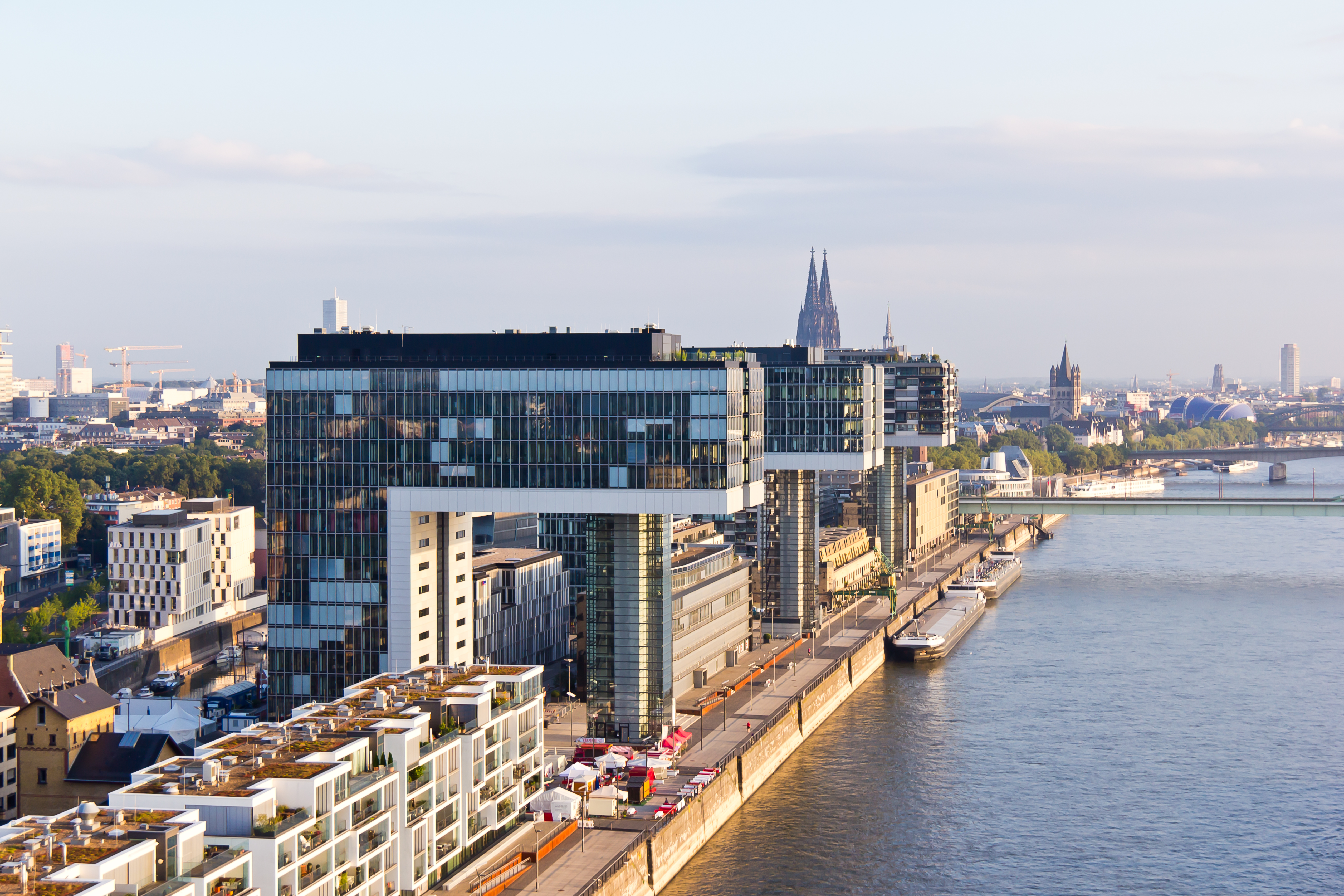 Ballonfahrt über Köln - Rheinauhafen, Kranhäuser